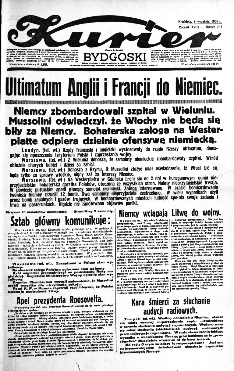 Kurjer Bydgoski, rocznik XVIII, nr 202, 3 września 1939 r.